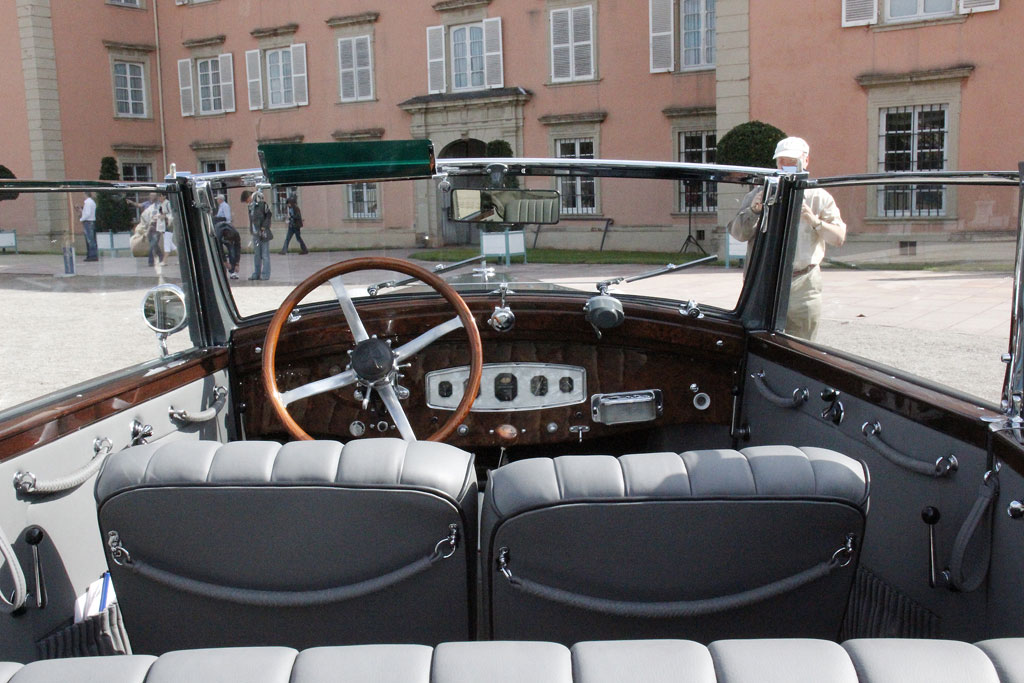 Röhr 8 Typ F Cabriolet 4-Fenster (1934) Hans Gustav Röhr gründete am 30. Oktober 1926 zusammen mit Hugo Greffenius, Hauptaktionär der MIAG, die Röhr Auto AG. Zusammen hatten beide ein Startkapital von ca. 500.000 Reichsmark. Im selben Jahr wurde das Gelände der Falcon Automobilwerke in Ober-Ramstadt übernommen. Im Herbst 1927 begann die Produktion des Röhr 8, dem der 1928 in Berlin erstmals der Öffentlichkeit vorgestellte Röhr 8 Typ R folgte. Das Fahrzeug war ein wirtschaftlicher Erfolg und man erreichte im selben Jahr einen Auftragsbestand von 2.200 Röhr-Wagen. Röhr beschäftigte 1929 etwa 800 Mitarbeiter. 1930 während der Weltwirtschaftskrise, mussten die „Röhr Auto AG“ Konkurs anmelden. Anfang 1931 stoppte die Produktion vorerst. Die Röhr Auto AG wurde mit Einverständnis der Gläubiger vom schweizerischen Röhr-Generalvertreter Joos Andreas Heintz übernommen. Unter dem Namen Neue Röhr AG wurde im April 1931 die Produktion wieder aufgenommen, Hans Gustav Röhr verließ sein Unternehmen jedoch. Im Frühjahr 1932 wurde als neues Modell der Röhr Junior vorgestellt. Die Machtergreifung der Nationalsozialisten und deren anschließende Repressalien gegenüber jüdischem Kapital schwächten die Röhr AG nachhaltig. Im Dezember 1934 musste deswegen erneut Konkurs angemeldet werden. Die Werkstätten in Ober-Ramstadt wurden im Frühjahr 1935 geschlossen. Sämtliche Fertigungsunterlagen und Werkzeuge standen zum Verkauf. Stoewer sicherte sich die Produktionsrechte am Röhr Junior und fertigte ihn als Stoewer Greif Junior bis 1939. Der Rest ging zunächst an die Gesellschaft für die Verwertung von Industrieanlagen mbH, die bis 1936 noch einige Röhr F bauen ließ. Schließlich pachtete die Noll-Monnard KG die Räume der vormaligen Reparaturabteilung und überarbeitete den Röhr F nochmals, jedoch ohne die Produktion beginnen zu können. Im Sommer 1937 wurden die Bemühungen endgültig eingestellt. Quelle